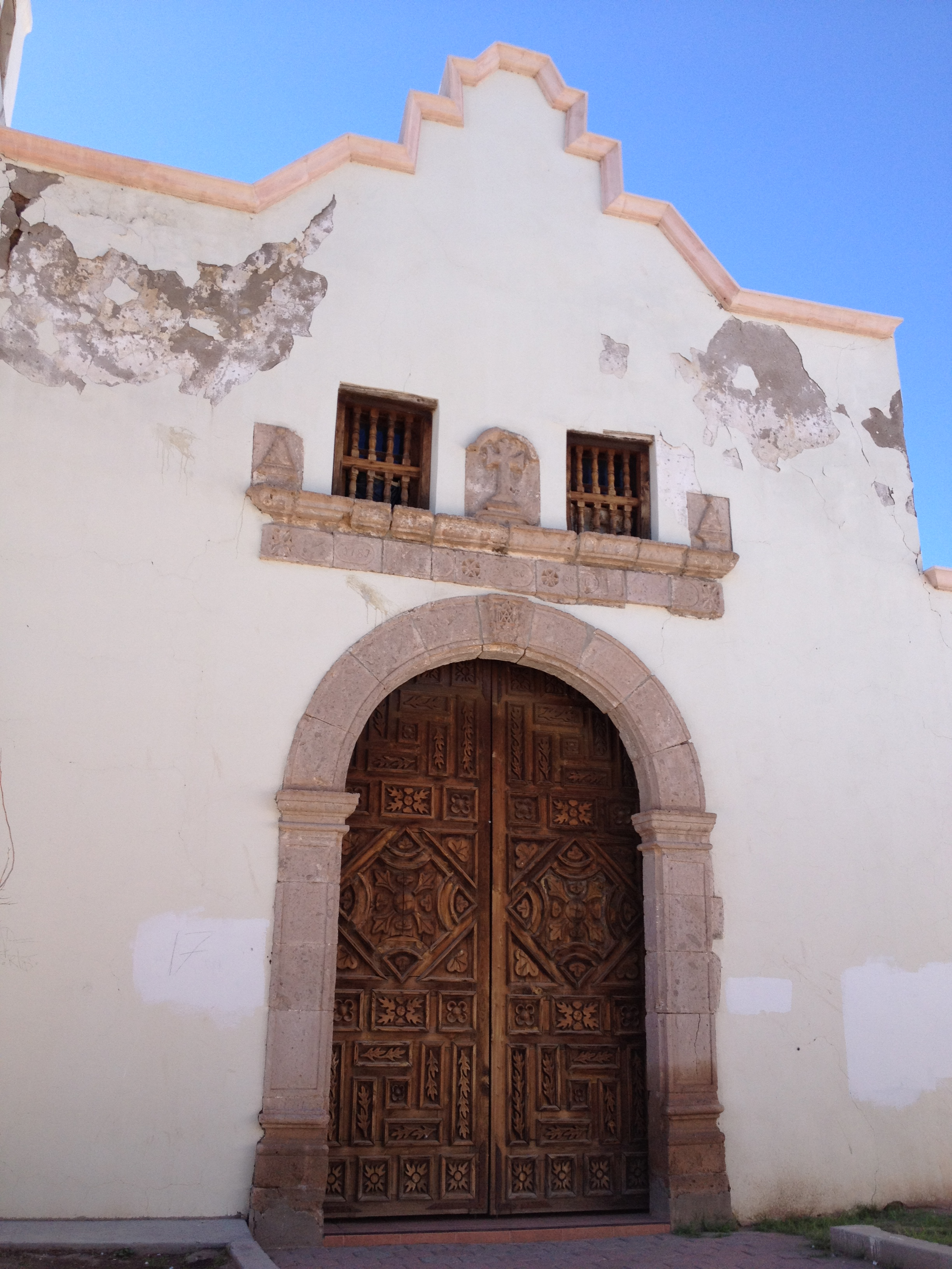 Portada del Templo de San Carlos en Aldama, Chihuahua